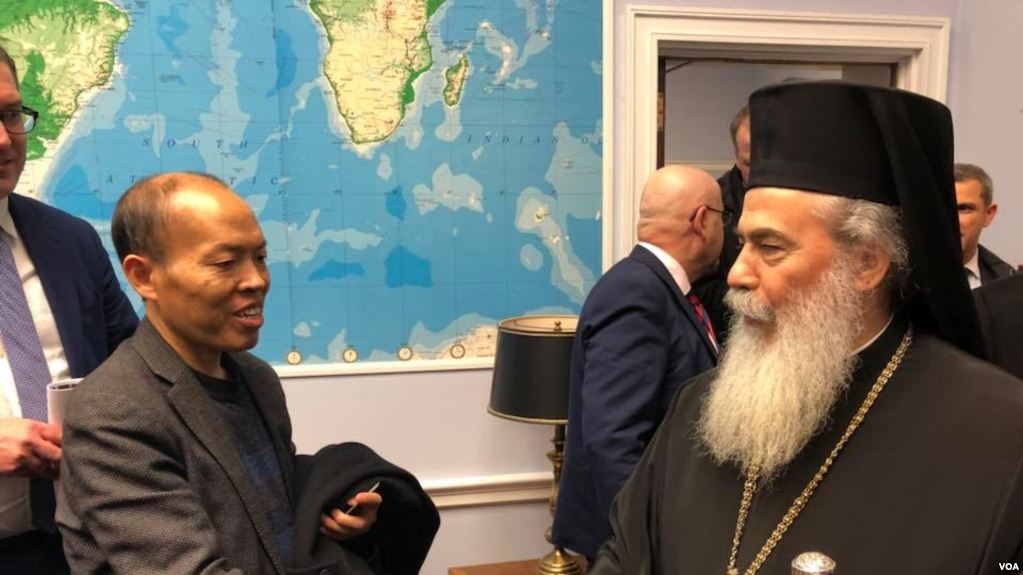 中文（中国大陆）: 李柏光今年2月7号在美议员办公室会见来自耶路撒冷的东正教大主教